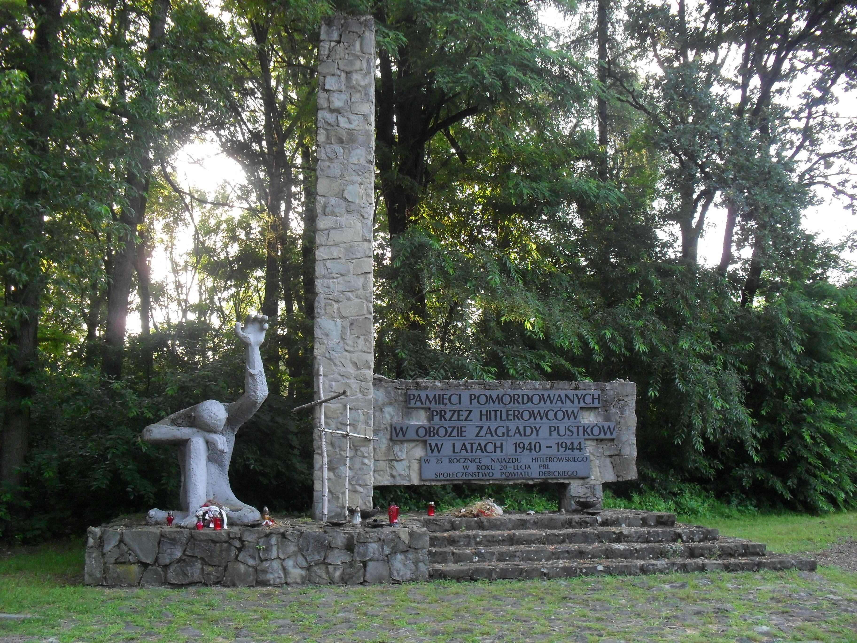 Pomnik pomordowanych w obozie Pustków